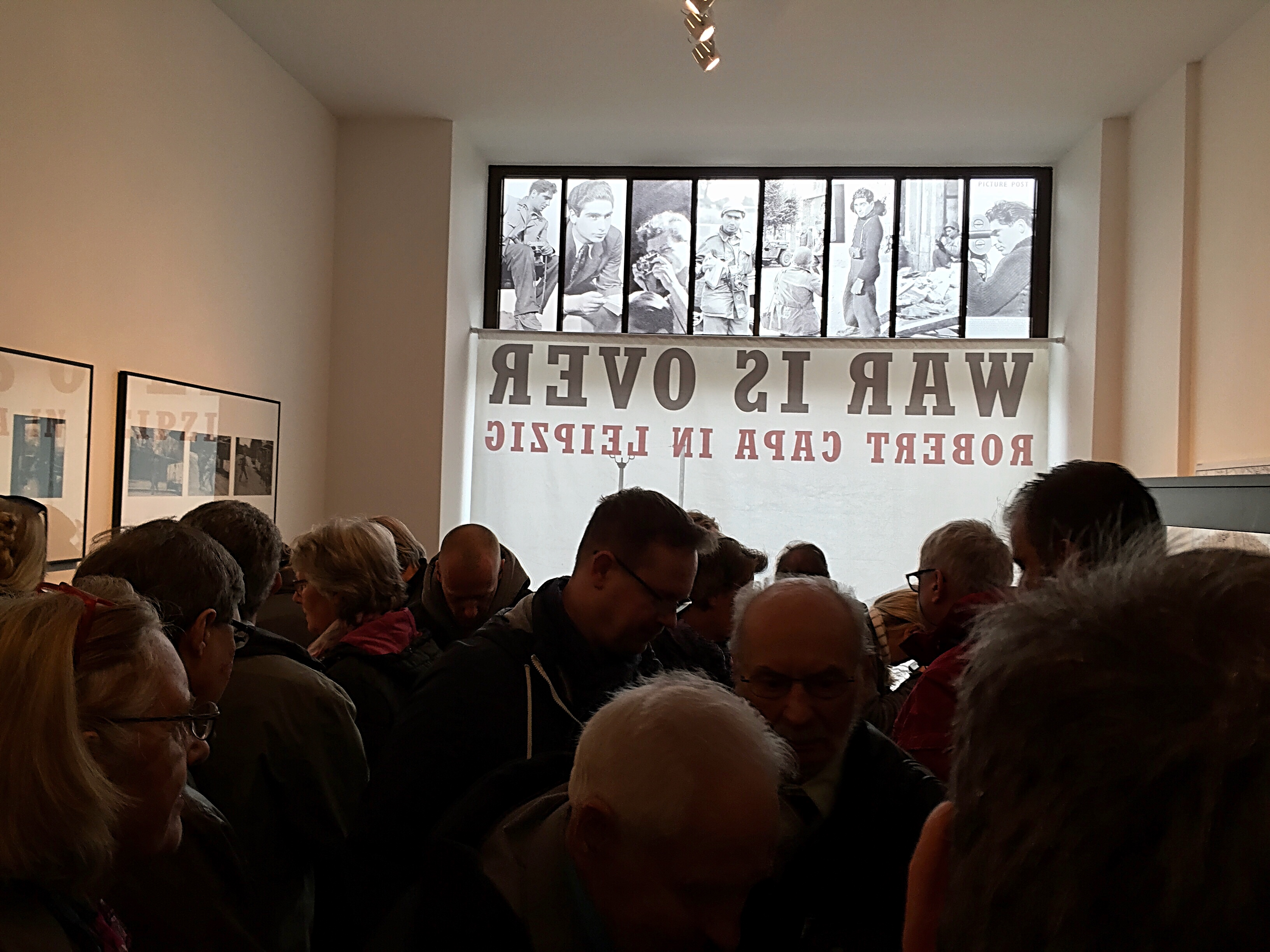 Ausstellung Robert Capa in Leipzig